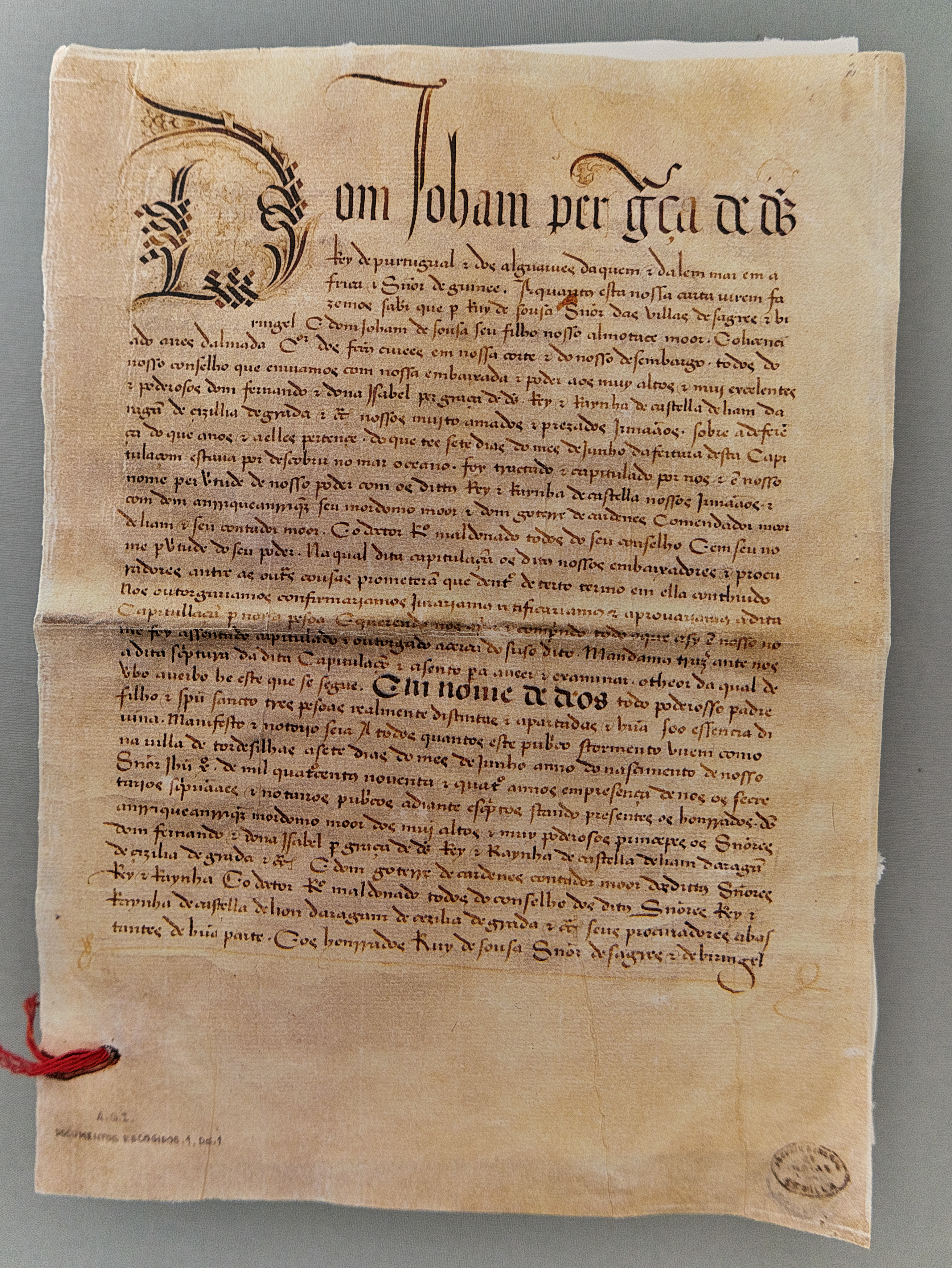 Reproducción del Tratado de Tordesillas